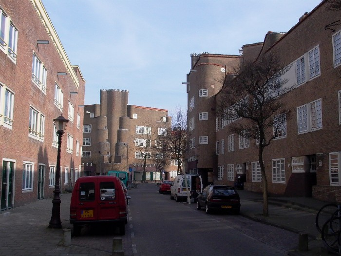 Foto gemaakt door Daniel van der Ree